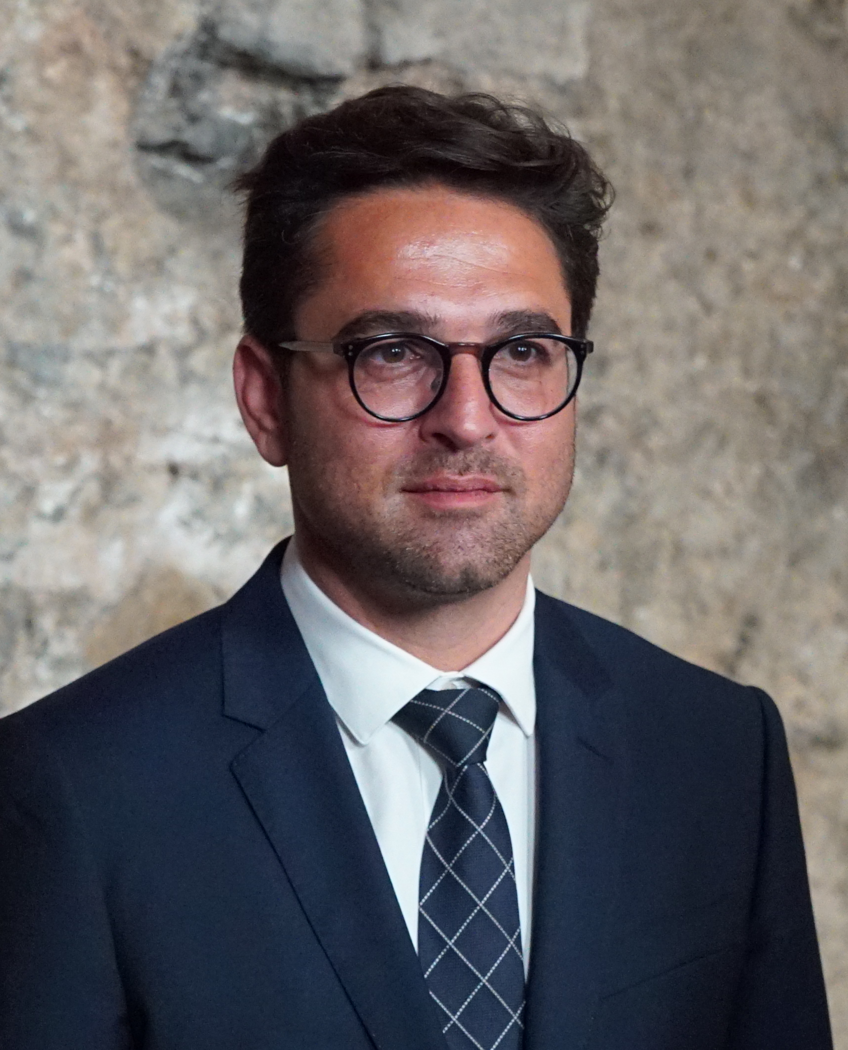 lors du lancement de "la Magnifique Society" dans le cryptoportique.